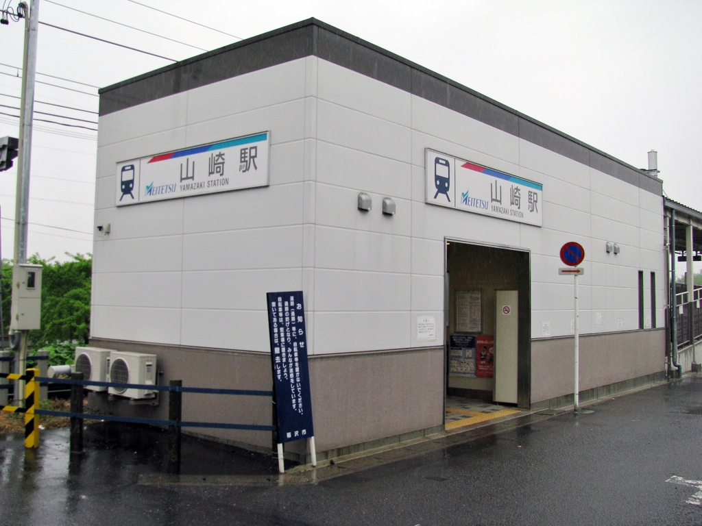 名鉄尾西線山崎駅